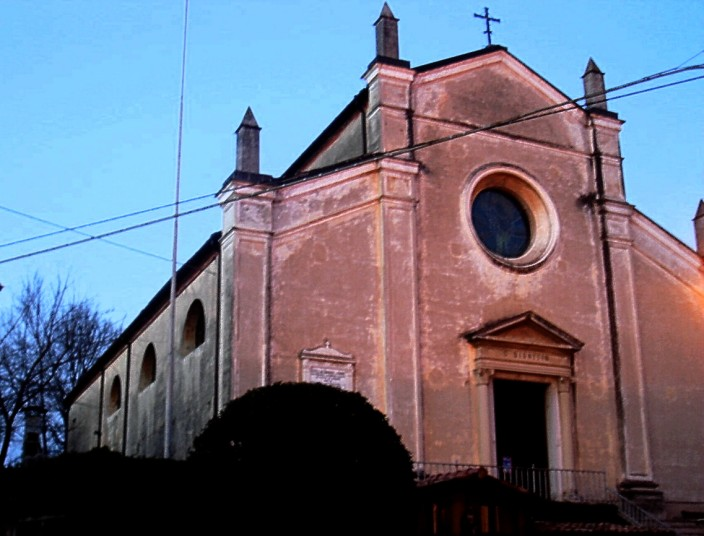 Collalbrigo (Conegliano, Treviso, Italia): chiesa di San Dionisio, facciata.